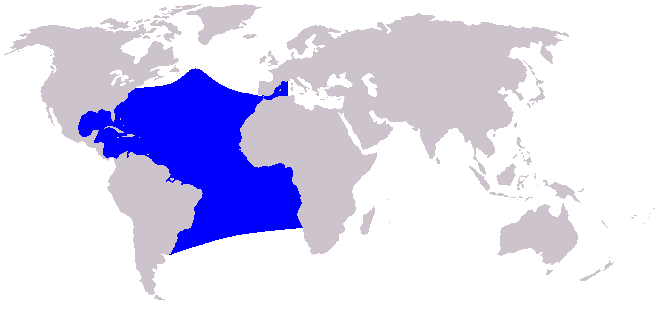 Karte des Verbreitungsgebiets des Zügeldelfins